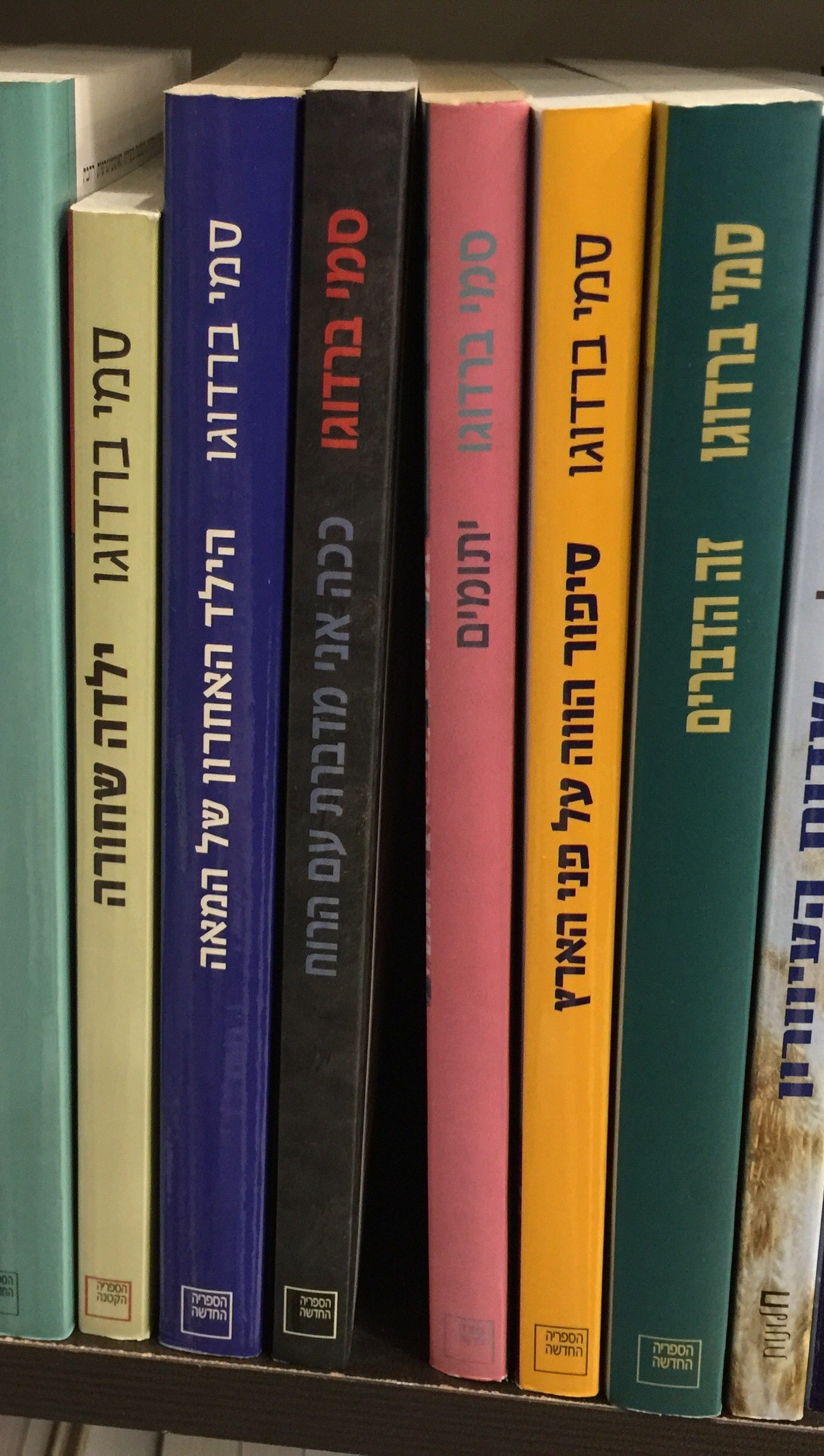 מספריו של סמי ברדוגו על מדף חנות ספרים בבאר שבע. צולם בדצמבר 2017.